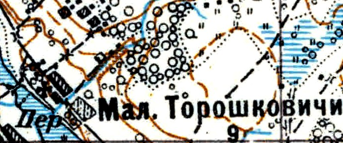 Топографическая карта Ленинградской области, квадрат Vc-29 (Батецкая), деревня Малые Торошковичи